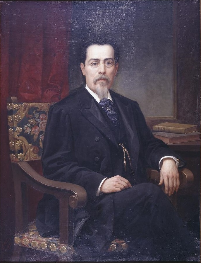 Retrato del dramaturgo y escritor español Manuel Tamayo y Baus (1829-1898).